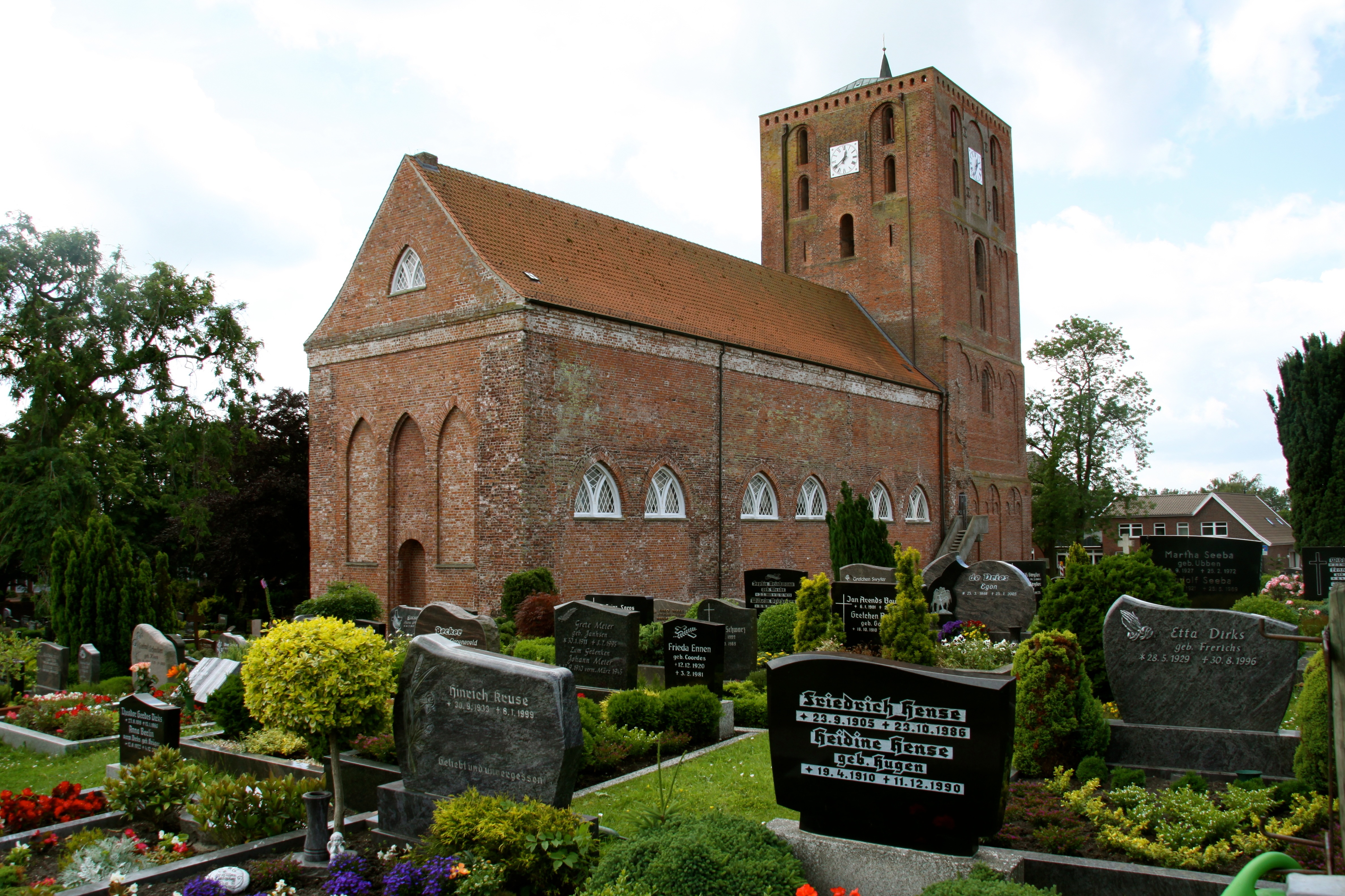 Die Mareienhafer Kirche